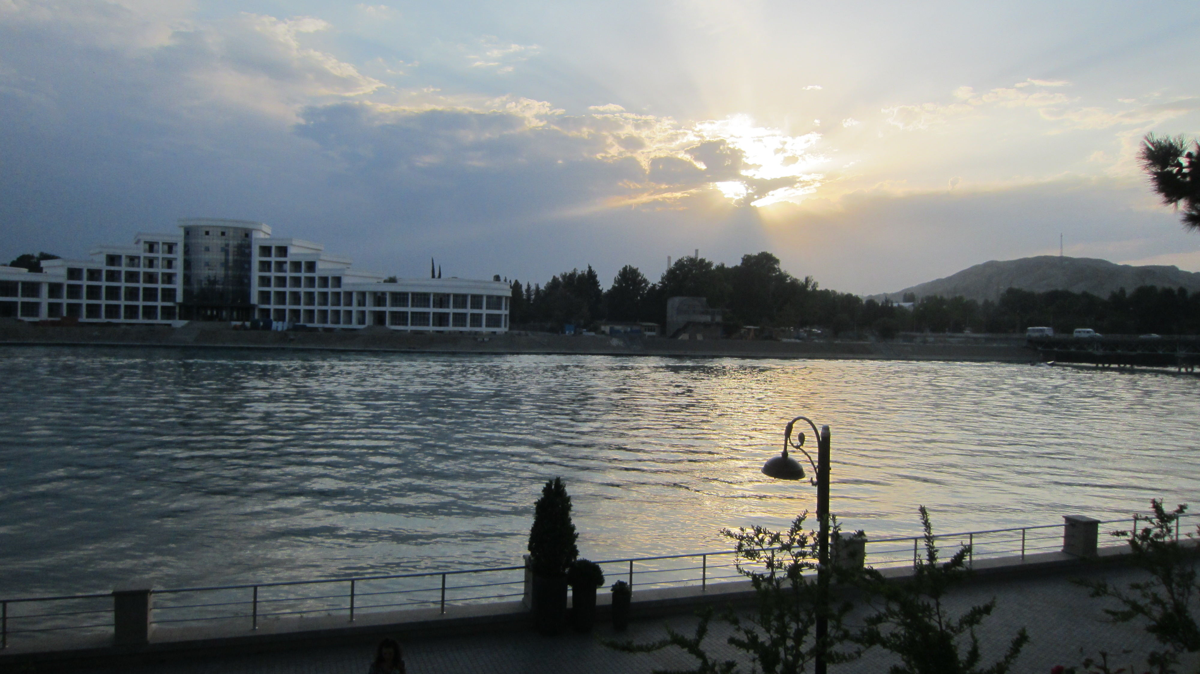 Mingəçevirdə qürub